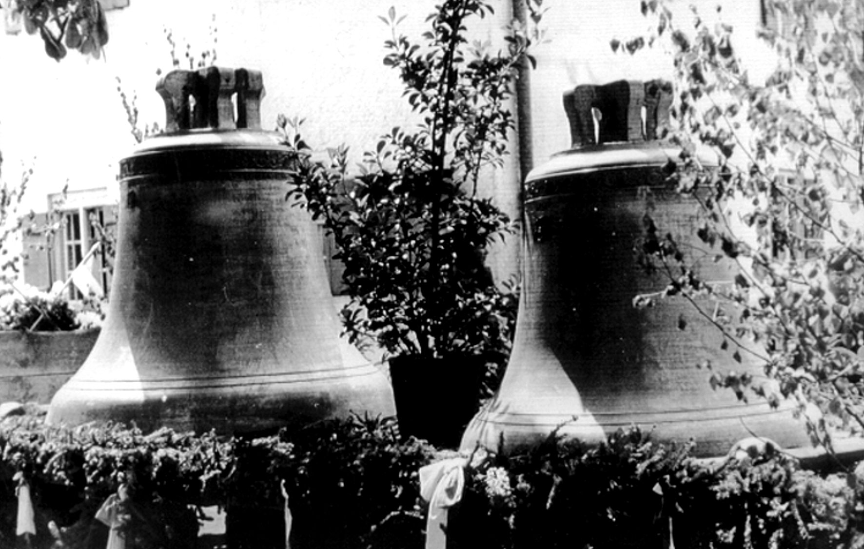 Starnberg, OT Perchting, Kirche Mariä Heimsuchung. Neue Kirchenglocken im Jahr 1948.